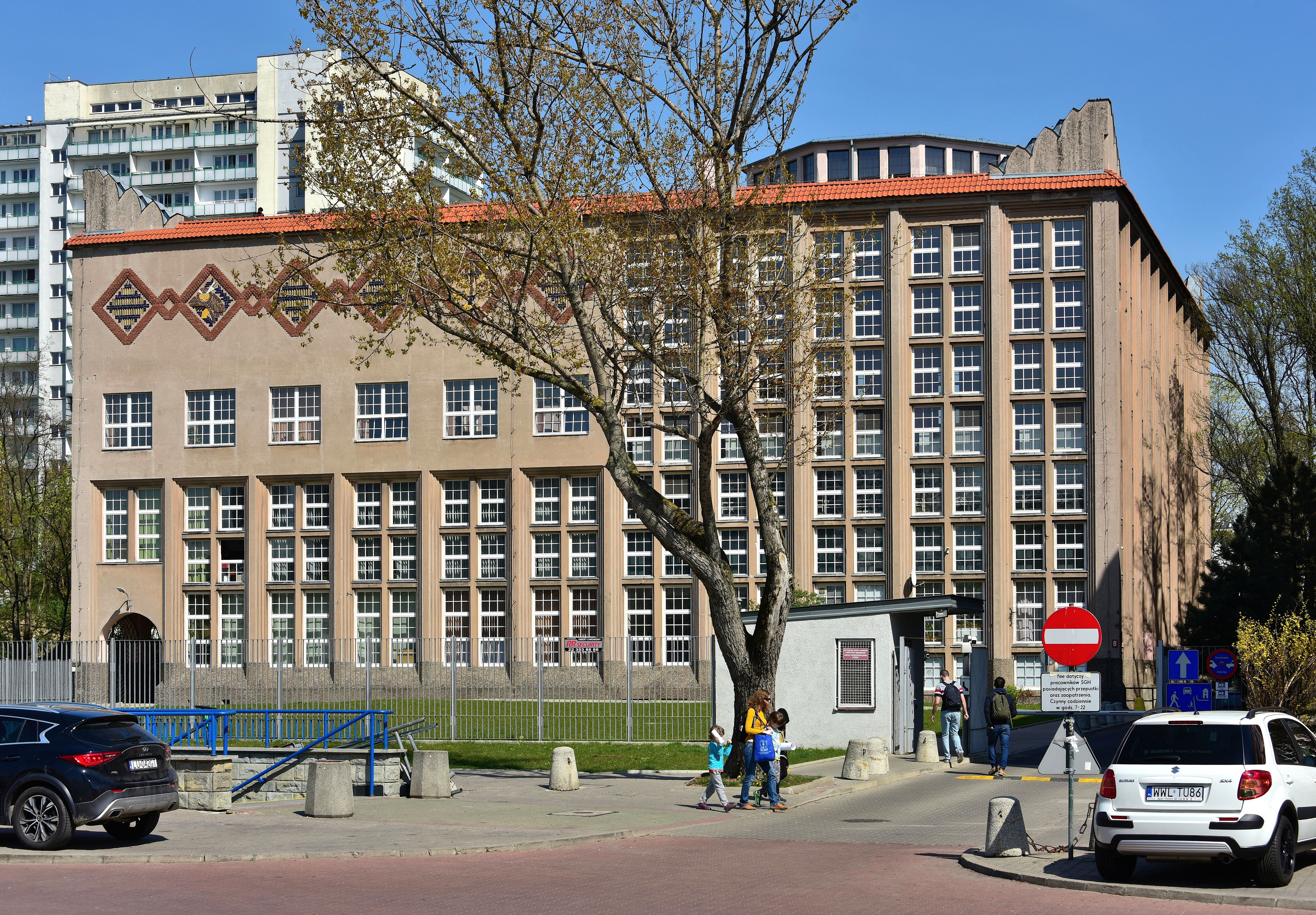 Budynek Biblioteki SGH przy ul. Rakowieckiej 22b, widok od strony al. Niepodległości